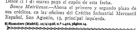 Banco Matritense abona el primero y el segundo plazo de sus credítos. en las oficinas de el Credíto Industrial Mercantil Español, San Agustín, 15, izquierda.